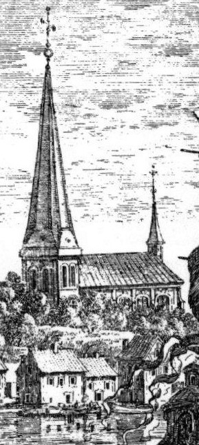 Detalj ur Erik Dahlberghs Suecia antiqua et hodierna, Fartalitium Waxholm - Vaxholms gamla kyrka